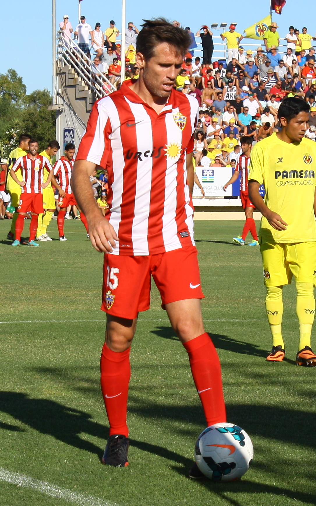 Fotografía de Corona, jugador de la U.D. Almería